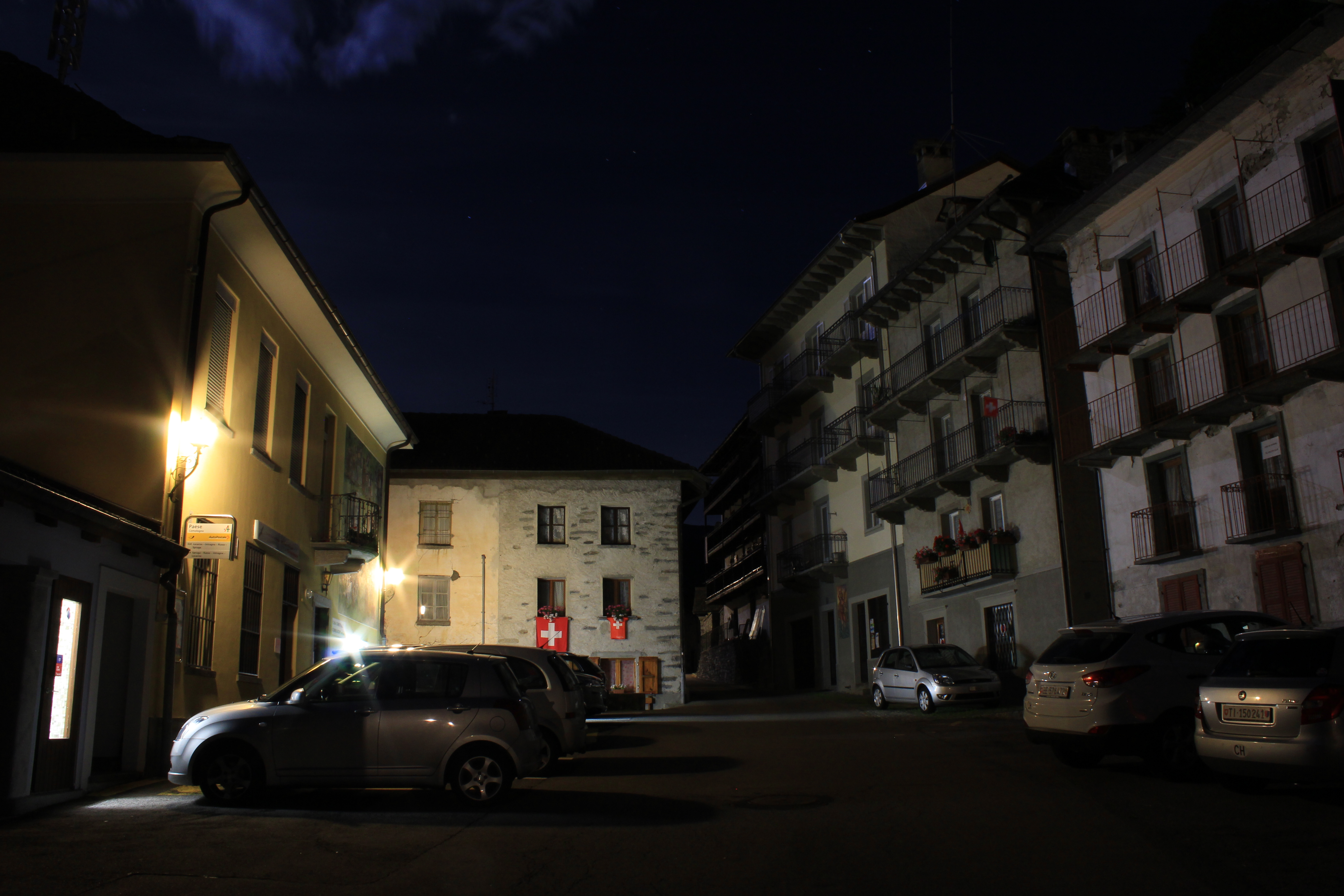 Piazza di notte